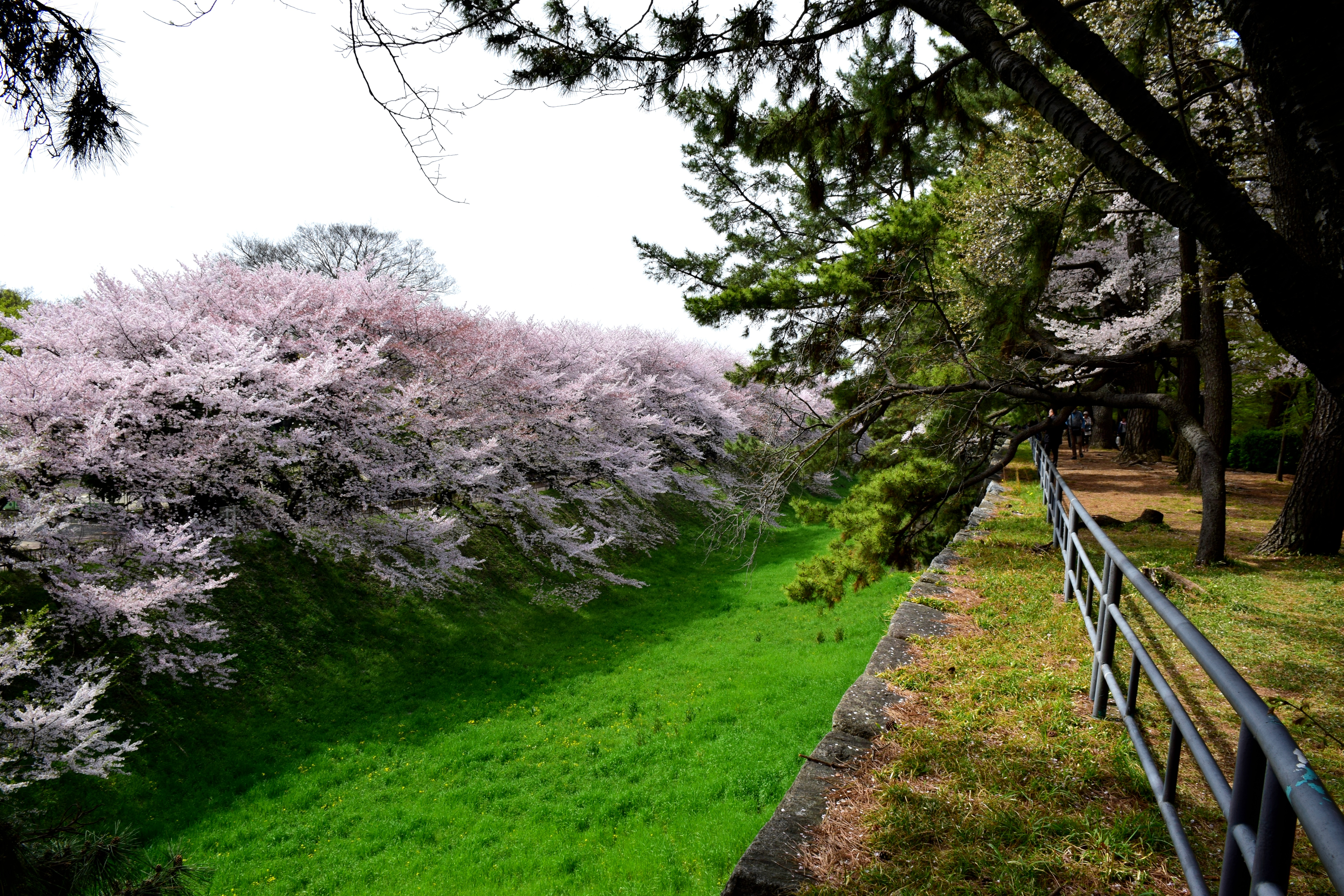 西之丸南側の外堀と桜